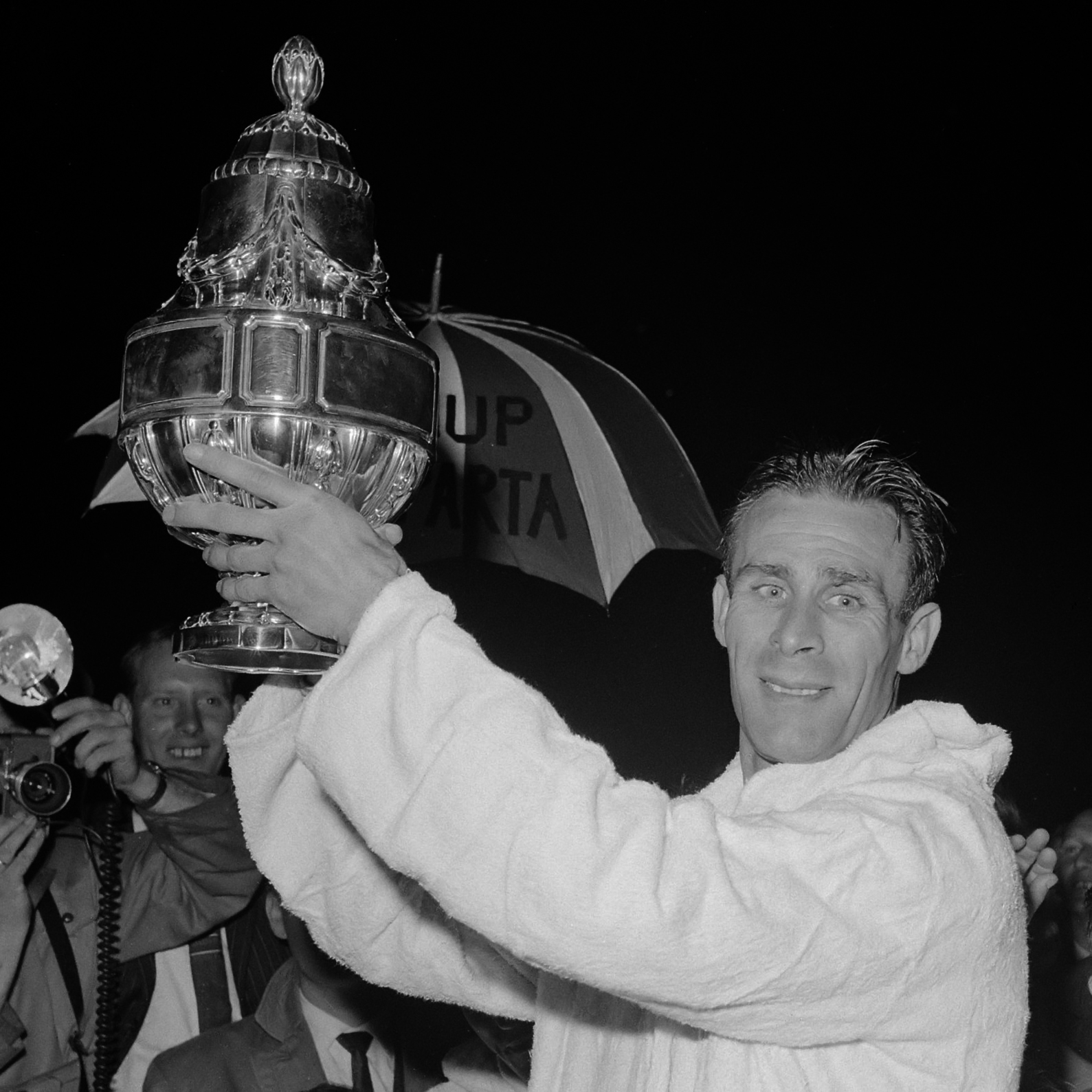 Finale KNVB-beker Sparta tegen DHC 1-0 Tonny van Ede krijgt KNVB-beker aangeboden 20 juni 1962